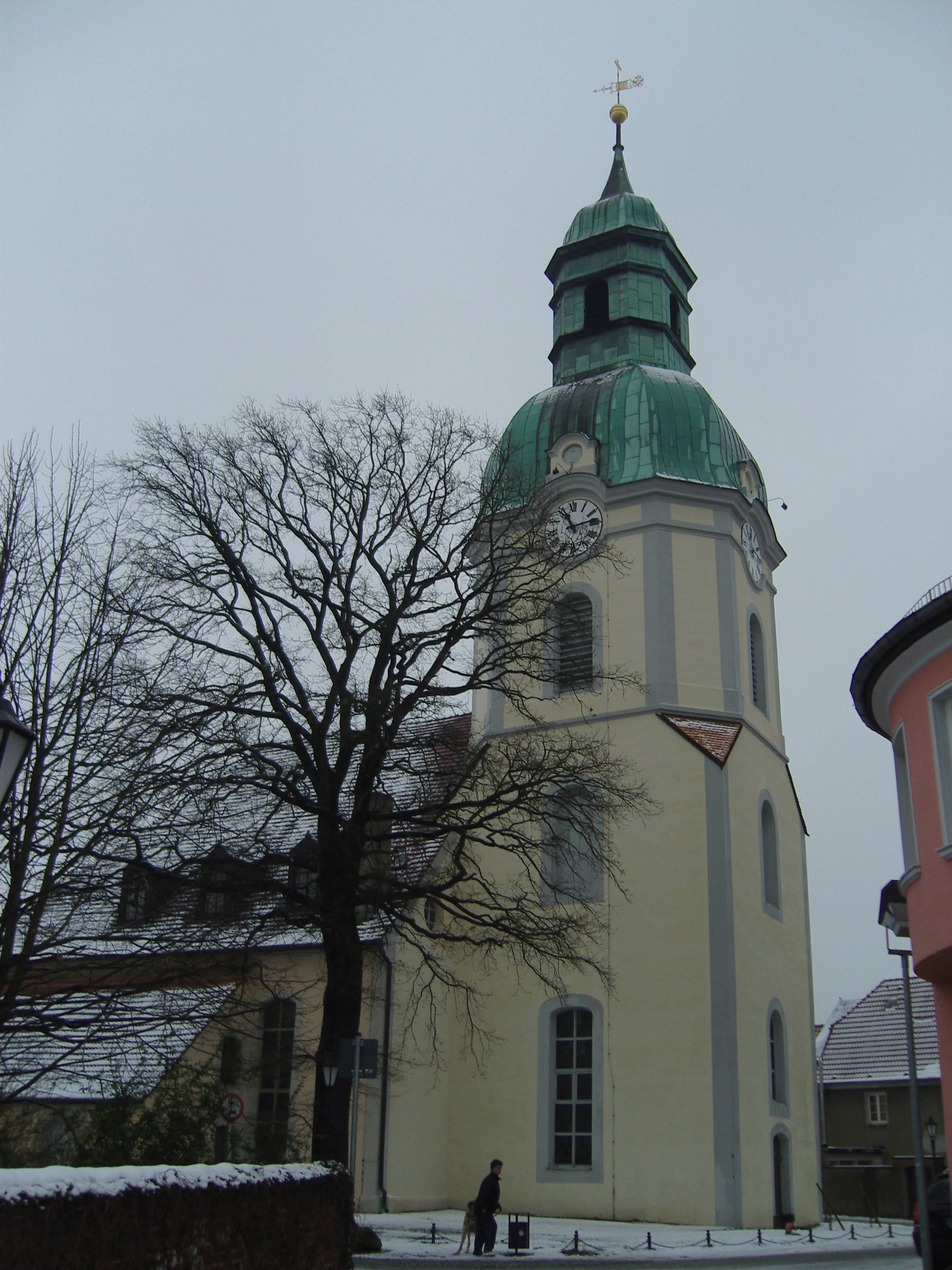 evangelische Kirche in Ruhland, Kirchplatz (ohne Hausnr.); denkmalgeschützt